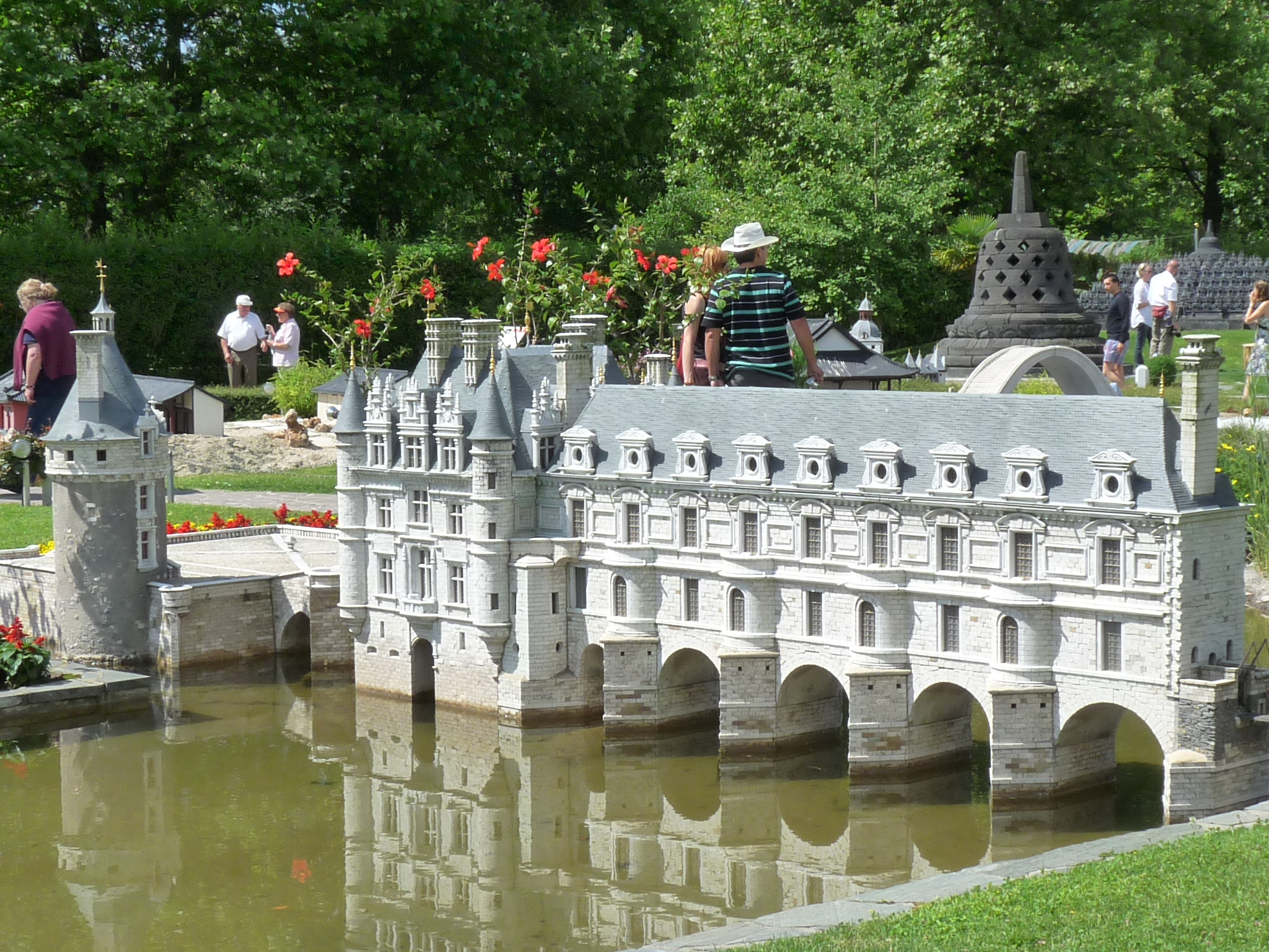 Minimundus Klagen Schloss Chenonceau